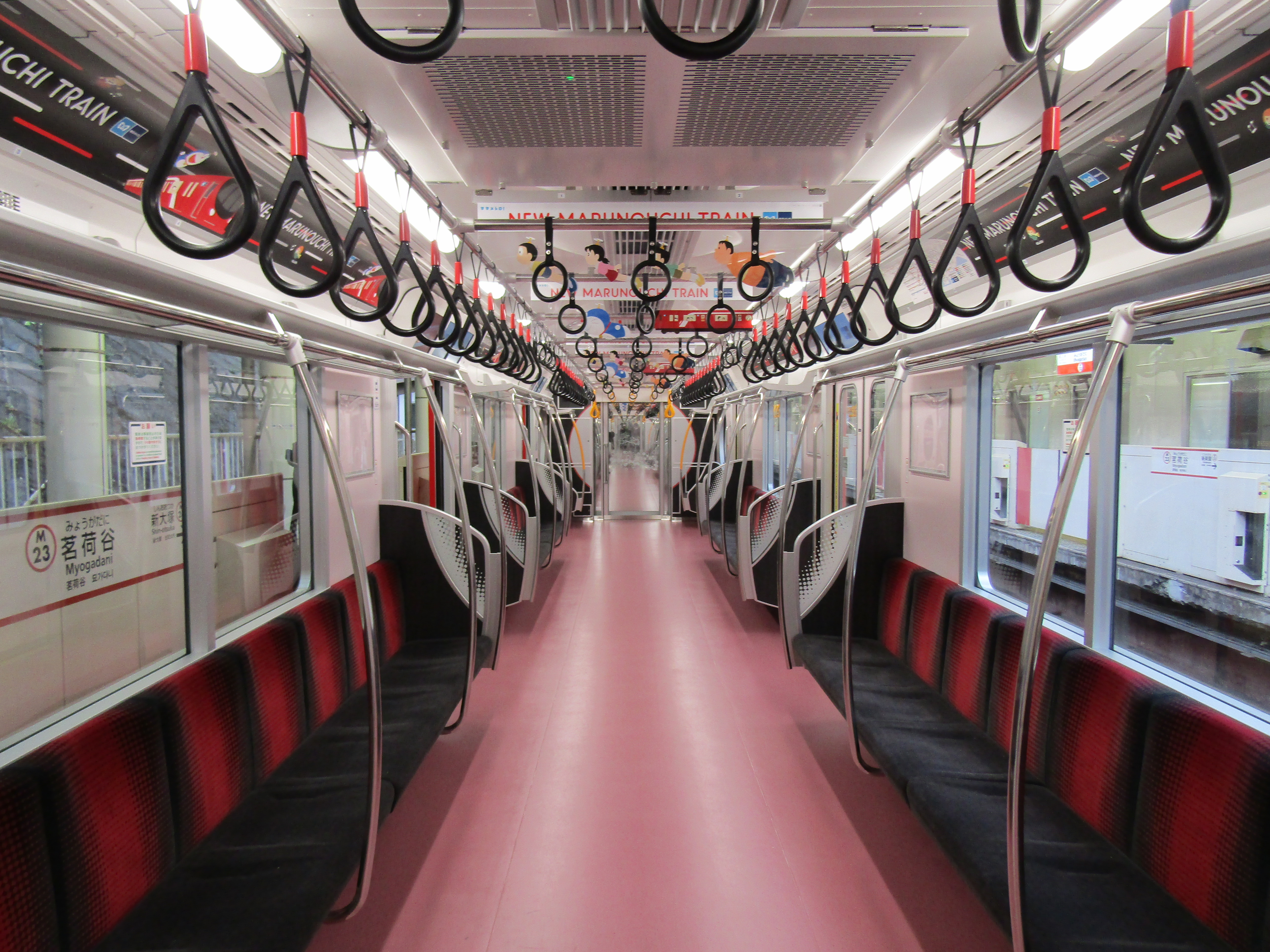 2000系車内